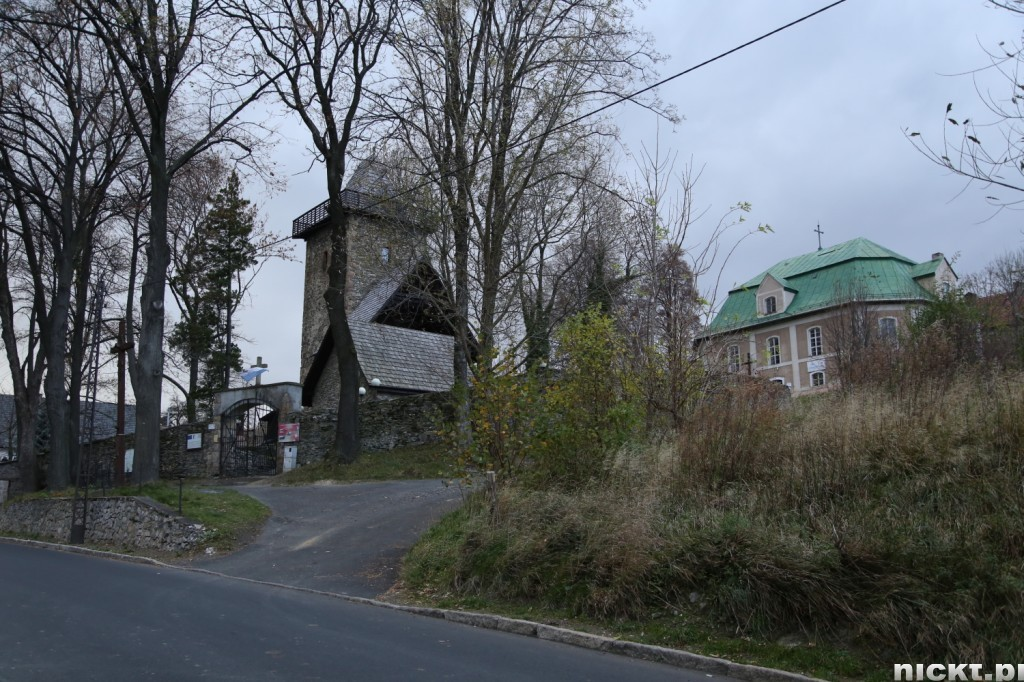 Wieza widokowa i kościół w Podgórkach